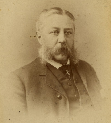 Louis Huet Massue